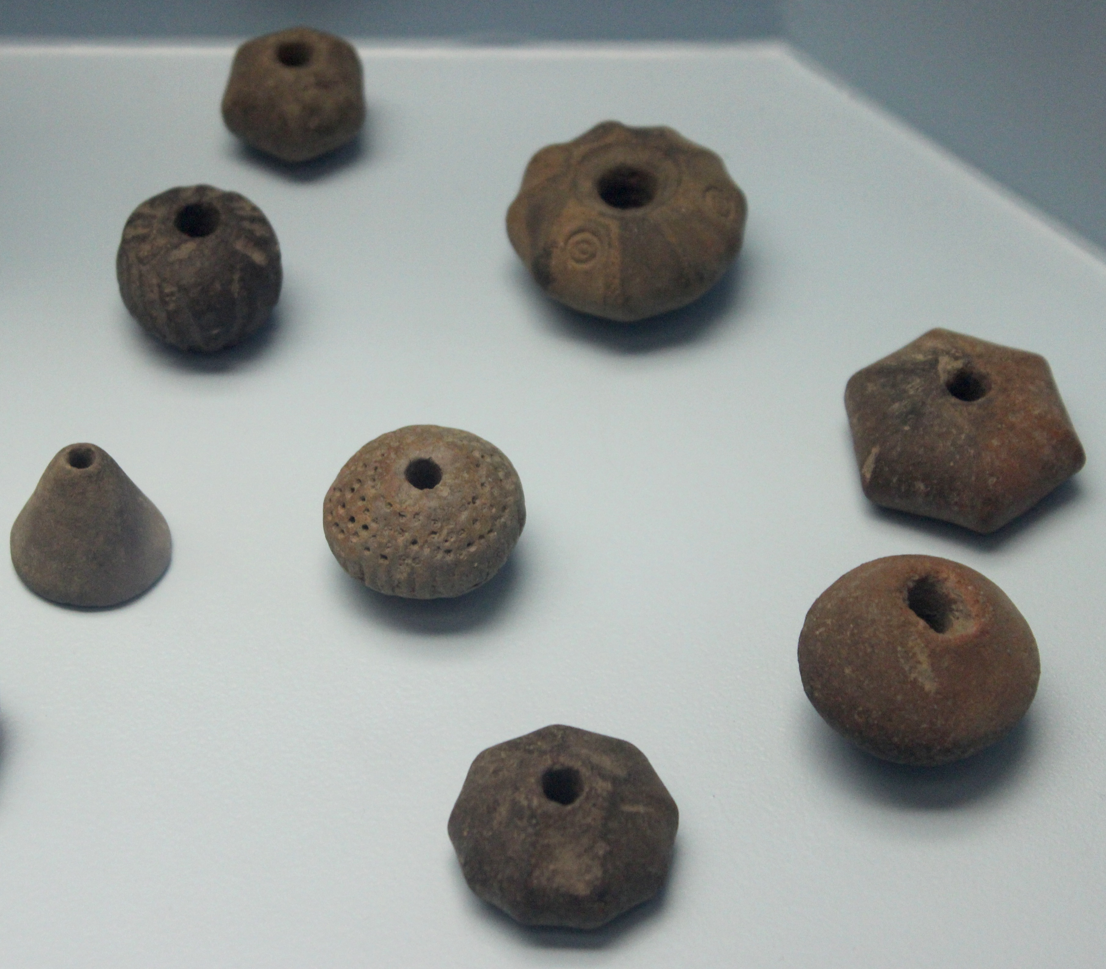 Paestum. Museo arqueológico. Fusayolas prehistóricas.